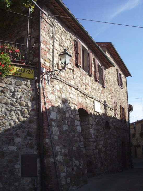 La casa dello scrittore Federigo Tozzi a Pari (GR)